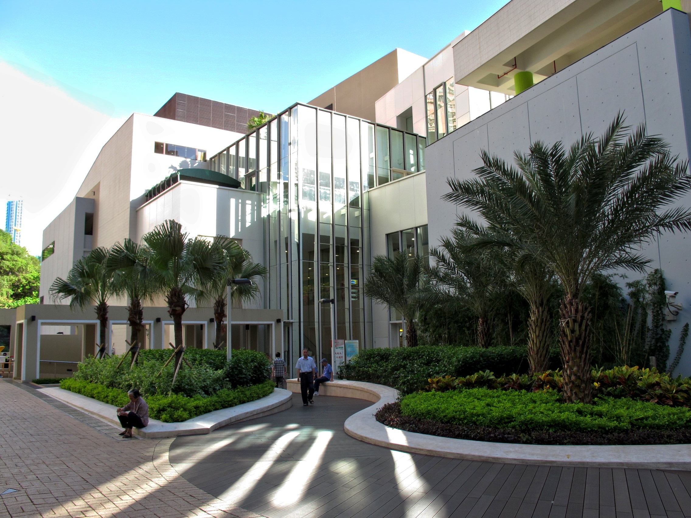 Yau Lai Shopping Centre